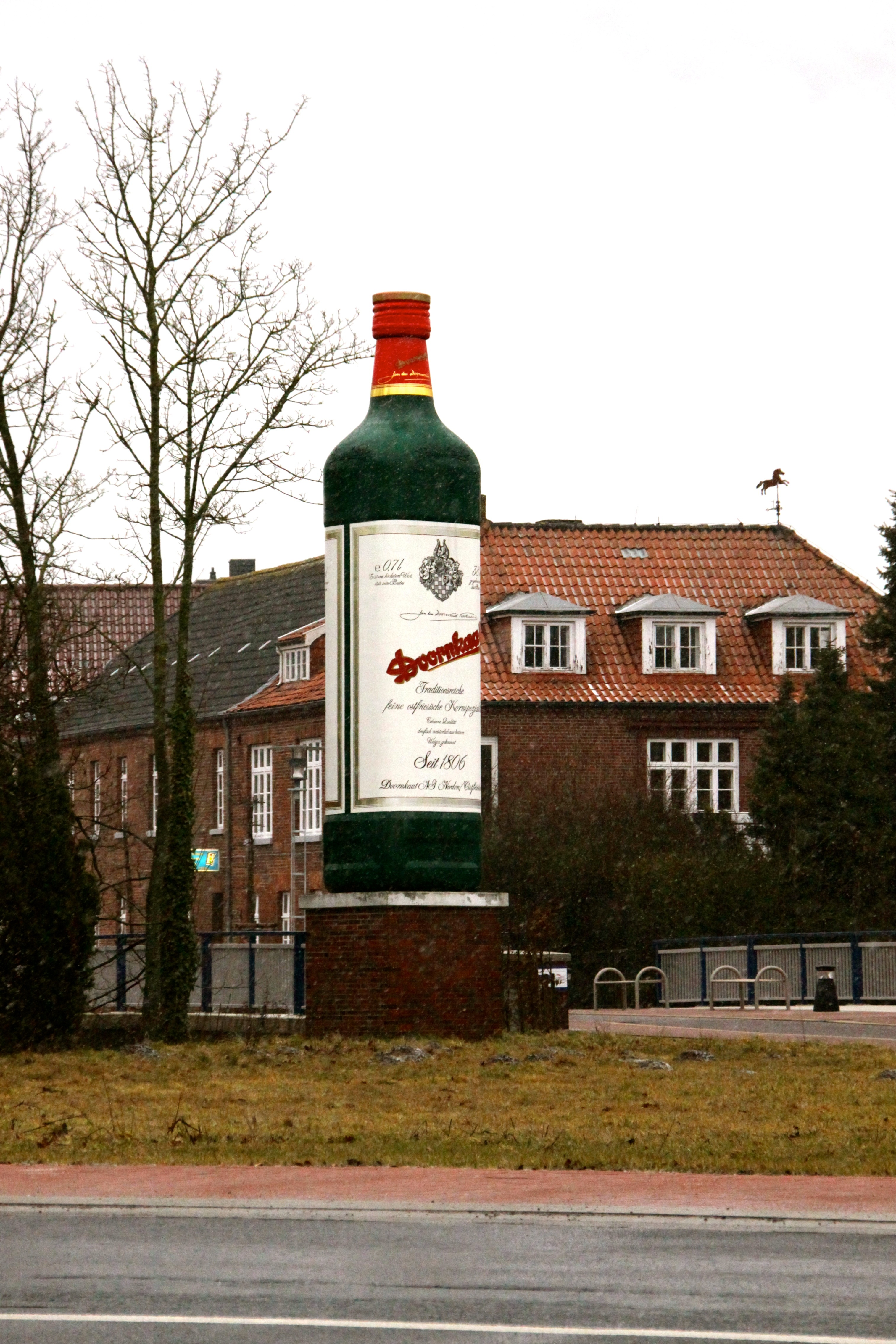 Doornkaat-Denkmal in Norden